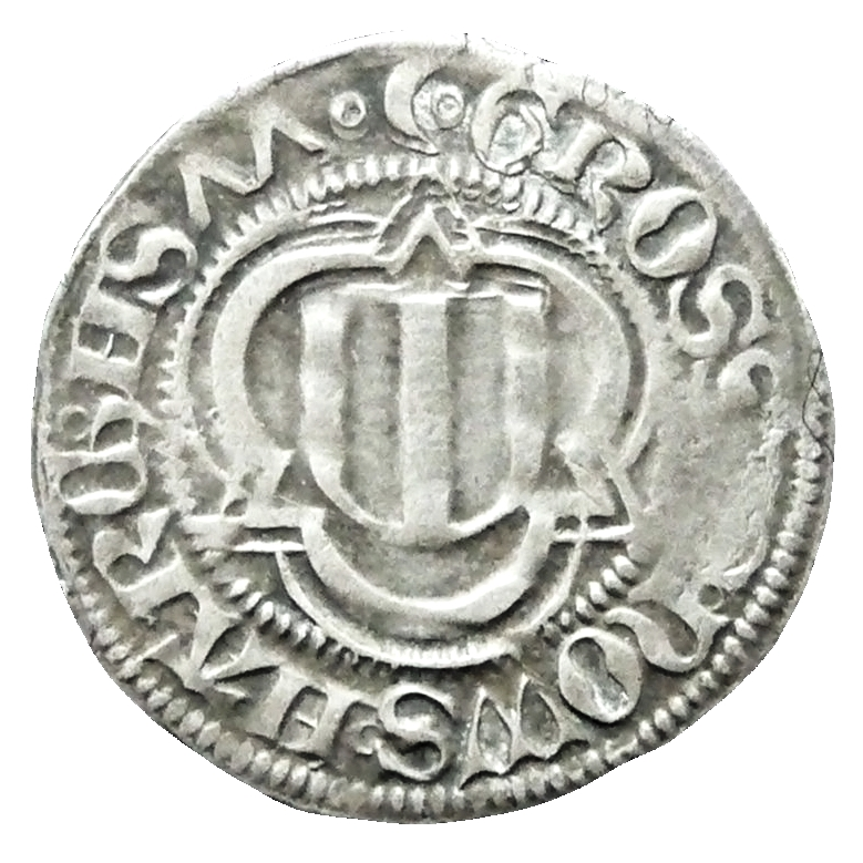 Silbergroschen 1477 "Spitzgroschen“ Revers Ernst, Albrecht und Wilhelm III. Prägung 1477 in sechs Varianten Münzstätte Zwickau, Münzmeister Conrad Funcke (1475-1477) Prägung gemäß sächsischer Münzordnung III. vom 9. Dezember 1475 mit 145 Stück aus der Erfurter Mark zu 235,4011 g 15 Loth = 937,50‰, Feingewicht: 1,522 g Innerhalb eines Stäbchenzierkreises Spitzdreipass mit dem halbrunden Wappenschild des Stammlandes der Wettiner, der Markgrafschaft Landsberg (Landsberger Pfahlschild); oben Münzzeichen Halbmond zwischen zwei Ringen danach Münzbezeichnung als Umschrift GROSSVS◦NOVVS◦HARCH◦HSɅɅ Neuer Groschen der Markgrafschaft Meißen 77